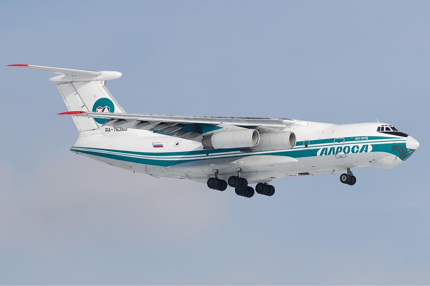 Alrosa Ilyushin Il-76